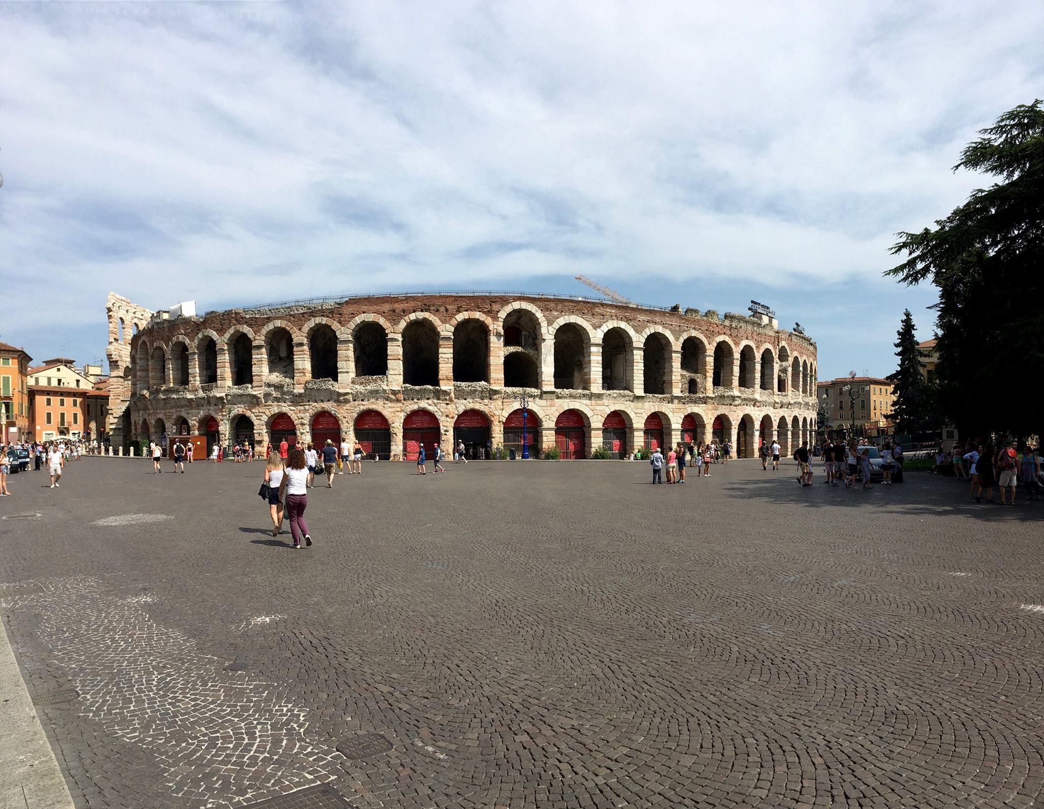 Arena di Verona This is a photo of a monument which is part of cultural heritage of Italy.